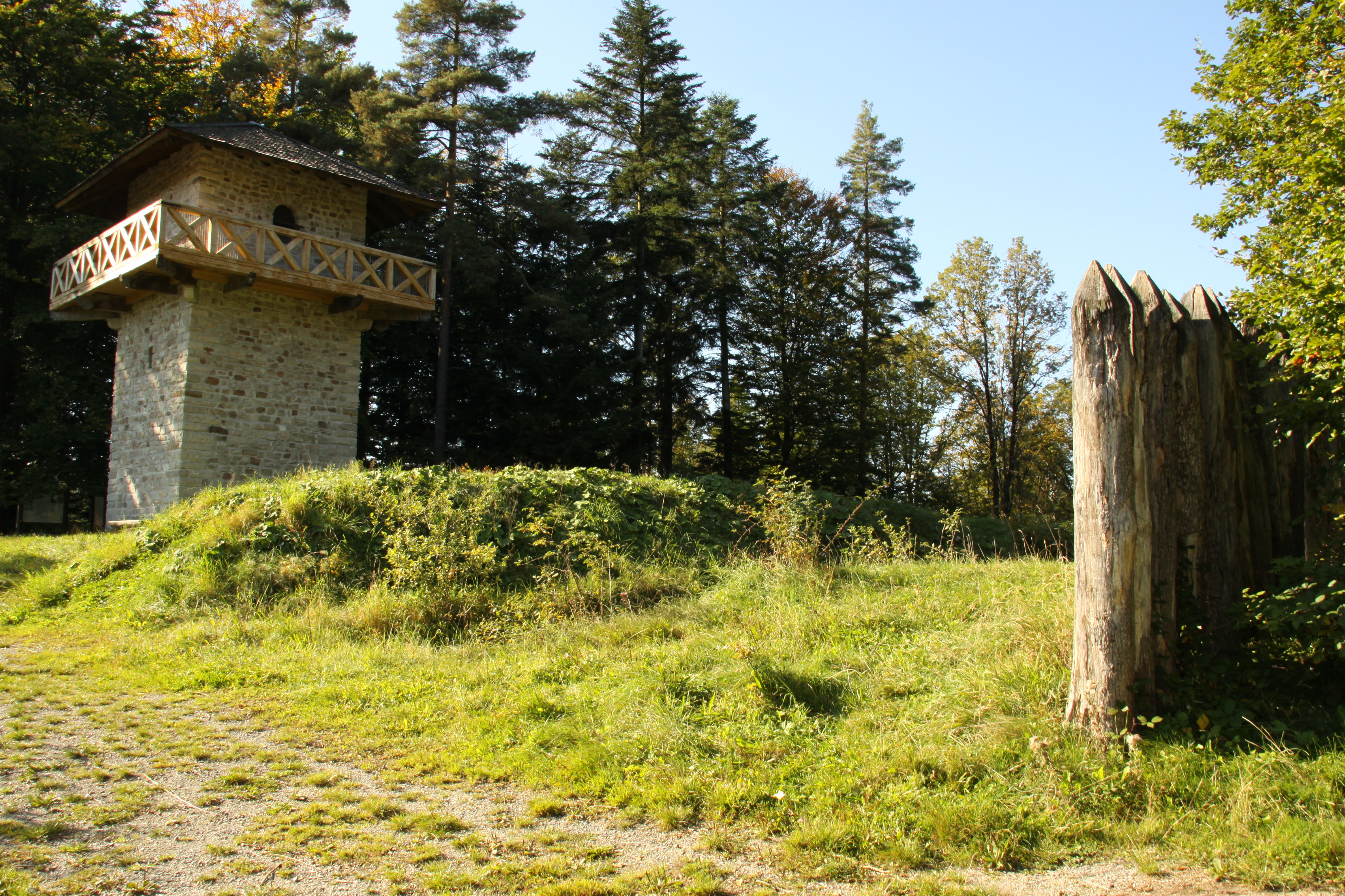 1981/82 rekonstruierter Limesabschnitt mit Wachturm (Wp 9/83) bei Großerlach-Grab (Rems-Murr-Kreis).